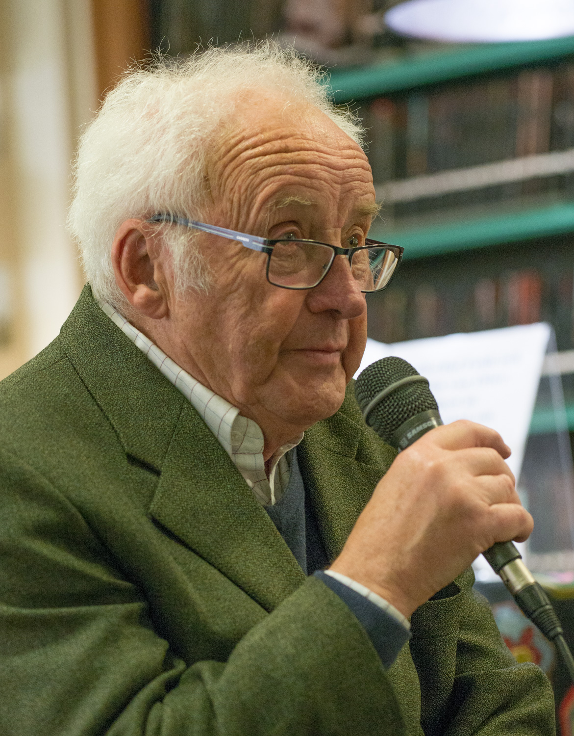 Kjell-Olof Feldt presenterar sin och makan Birgitta von Otters bok "Vägen ut. En loggbok om alkoholism och medberoende" på Hedengrens i Stockholm den 18 oktober 2016.